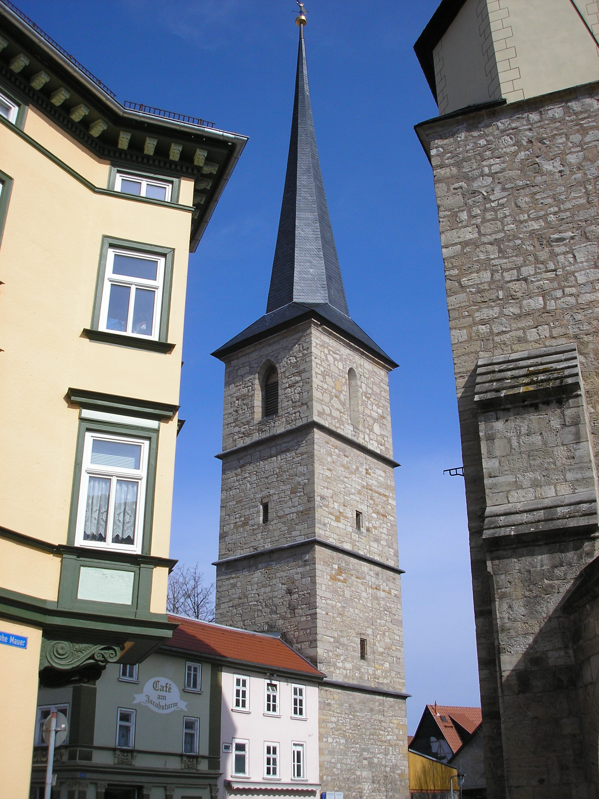 Der Jakobsturm in Arnstadt (Thüringen).